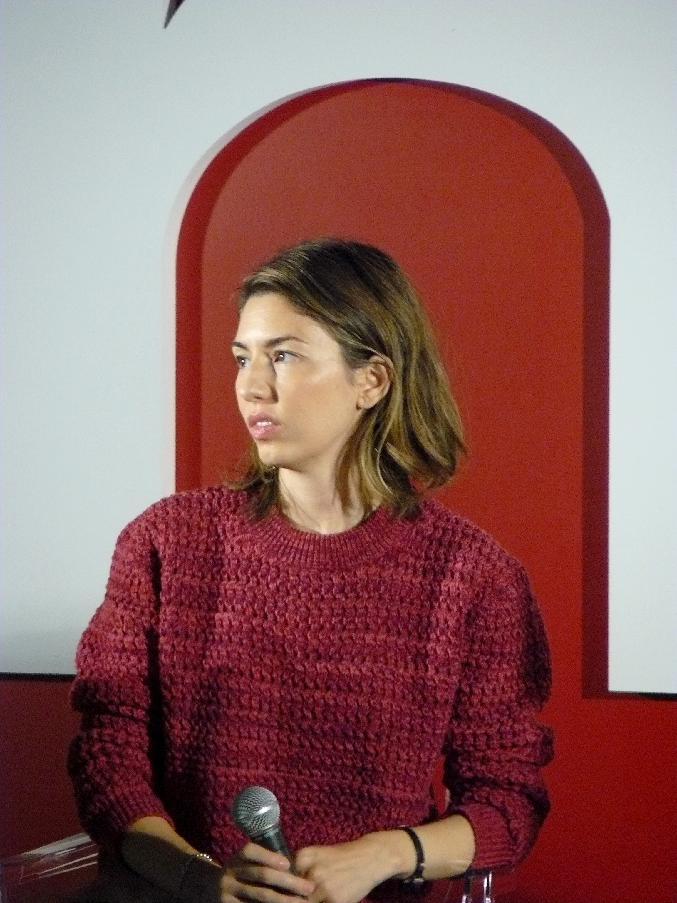 Sofia Coppola, le 7 novembre 2010 à la FNAC Montparnasse, lors d'une rencontre Masterclass à l'occasion de la sortie en janvier 2011 de son dernier film Somewhere.